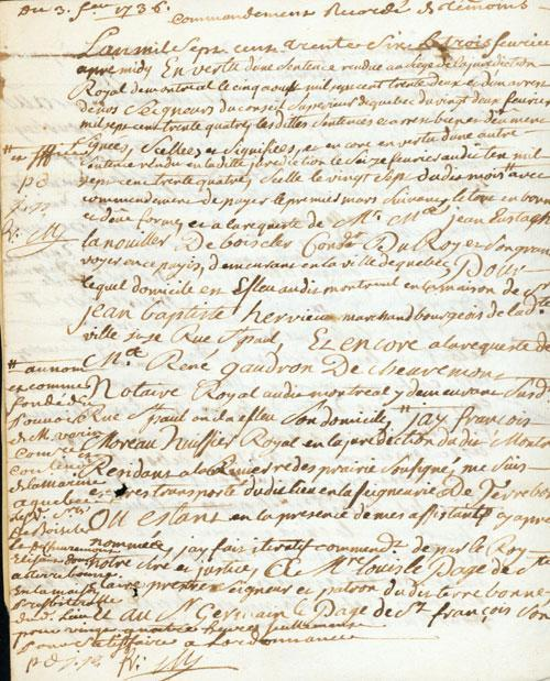 Première page de trois d'une sommation à Louis Lepage de Ste-Claire et Germain Lepage de St-François de payer à Jean Eustache Lanouiller de Boisclerc ce à quoi ils ont été condamnés par diverses sentences antérieures, sous peine de saisie.